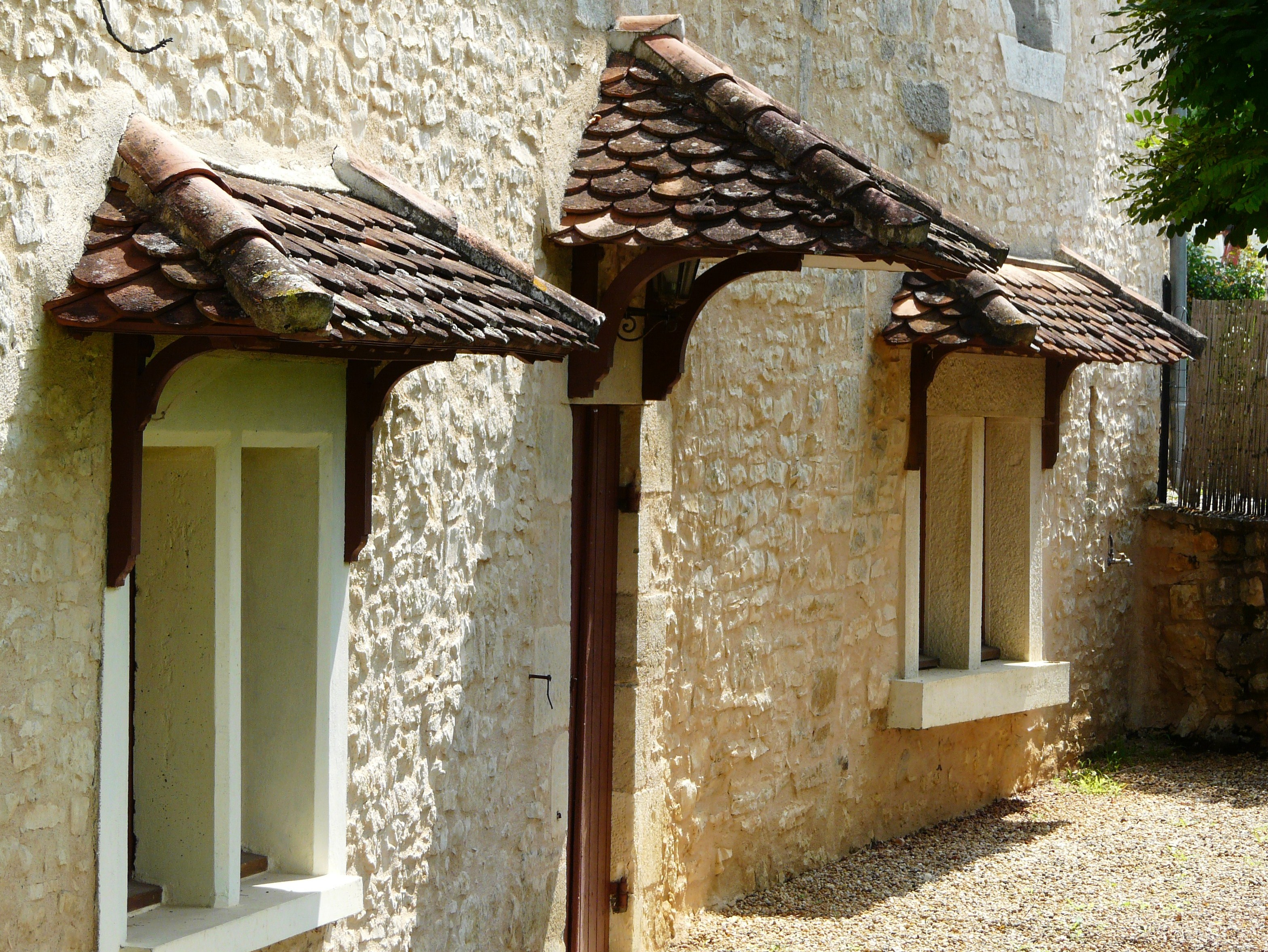 Trois auvents surmontent la porte et les deux fenêtres d'une maison à Saint-Pardoux-d'Ans, Saint-Pantaly-d'Ans, Dordogne, France.